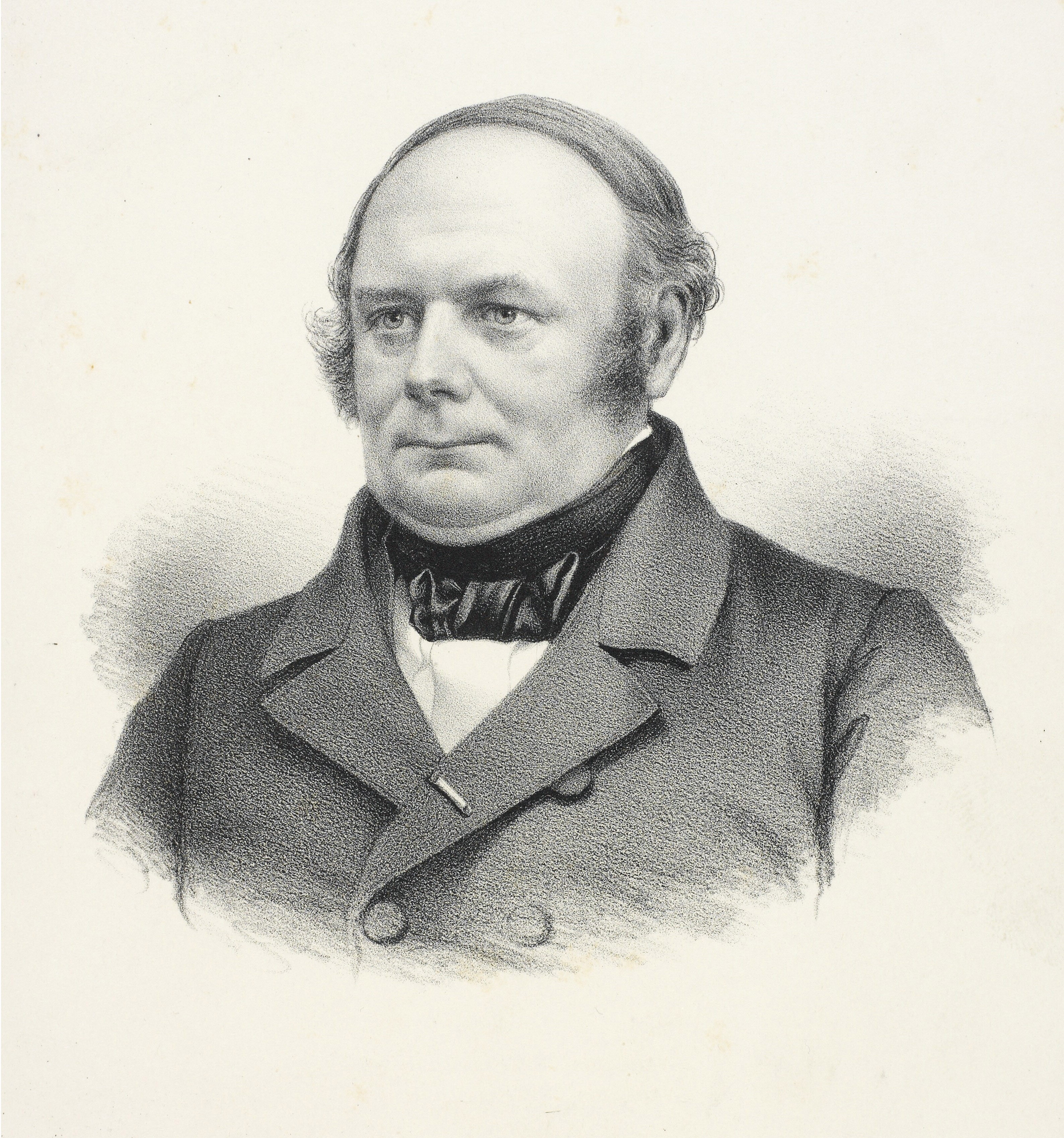 Carl Edvard Rotwitt (2. marts 1812 i Hillerød –8. februar 1860) var en Dansk politiker. Rotwitt valgtes allerede til folketinget i 1849, og sad der til sin død. Han var konseilspræsident 1859-1860 i spidsen for Ministeriet Rotwitt